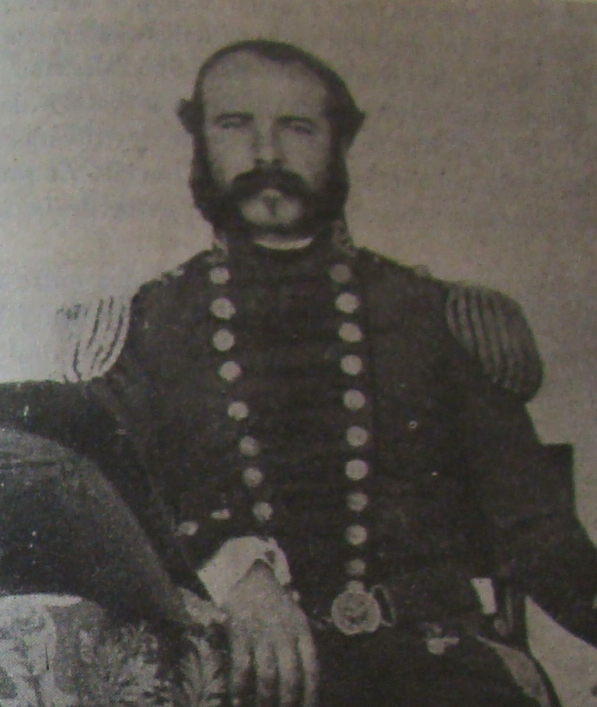 Almirante Mariano Cordero (1818-1899)